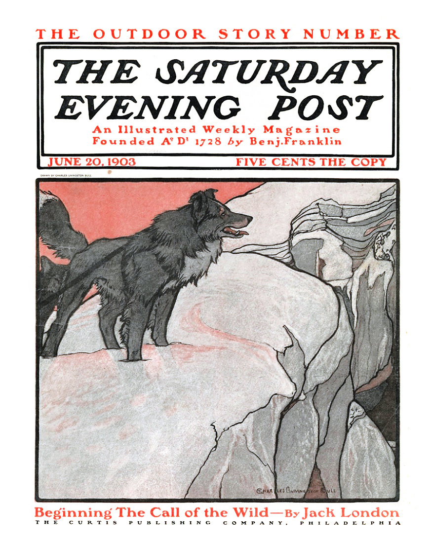 Charles Livingstone Bull, couverture du Saturday Evening Post 20 juin 1903, illustration de L’Appel de la Foret de Jack London